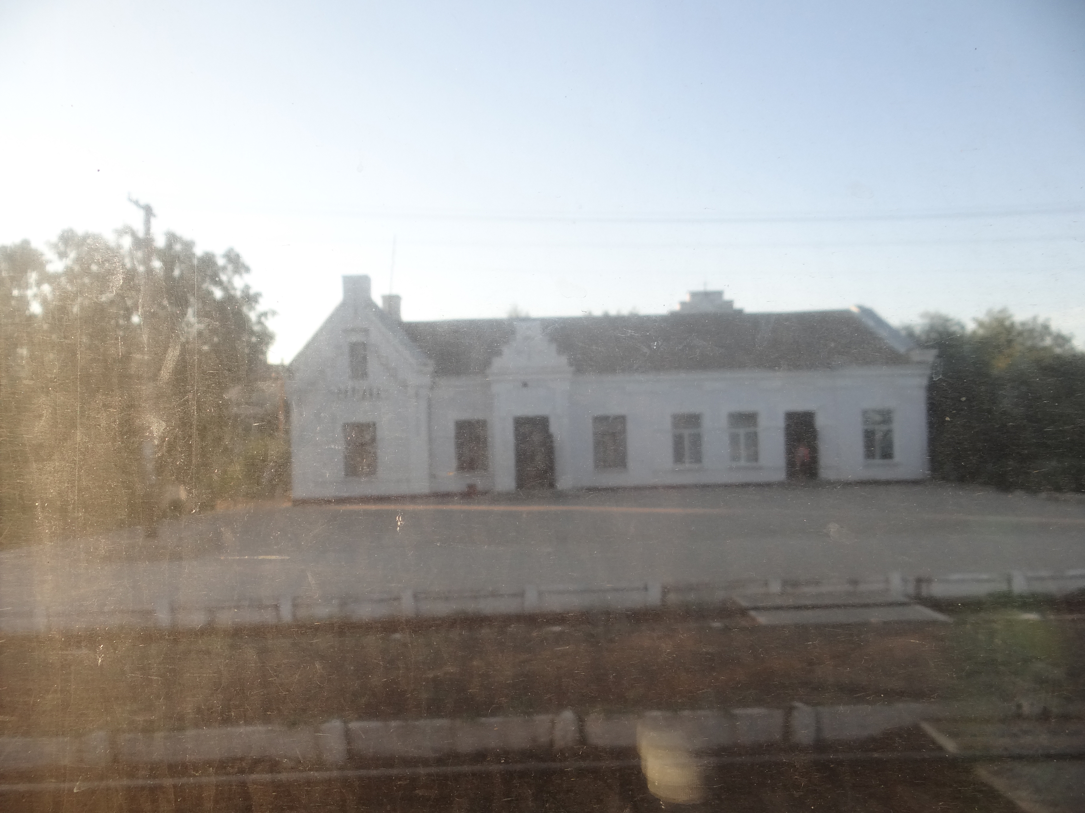 Розівка